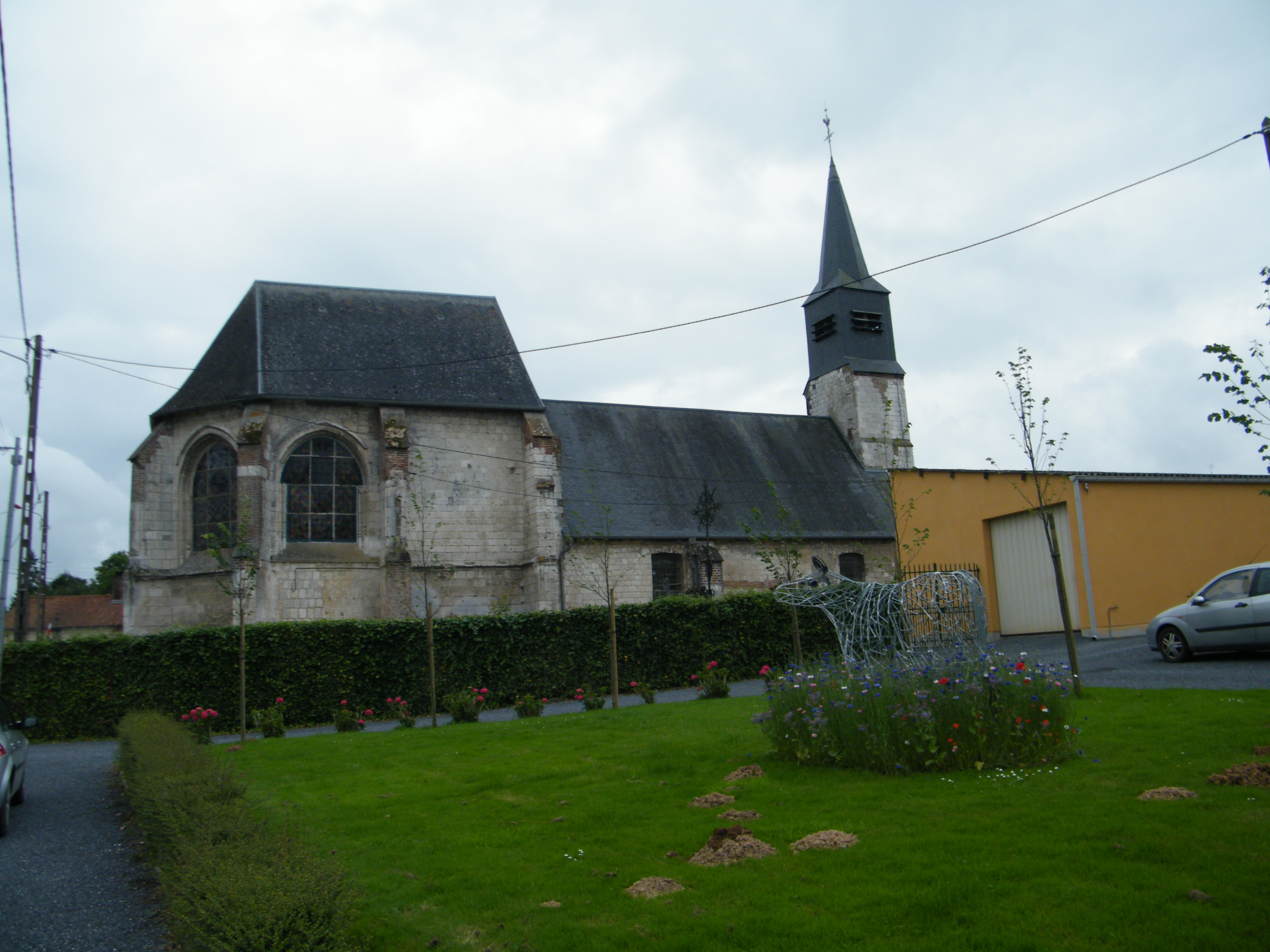 L'église Saint-Jean-Baptiste d'Heuzecourt, Somme, France.